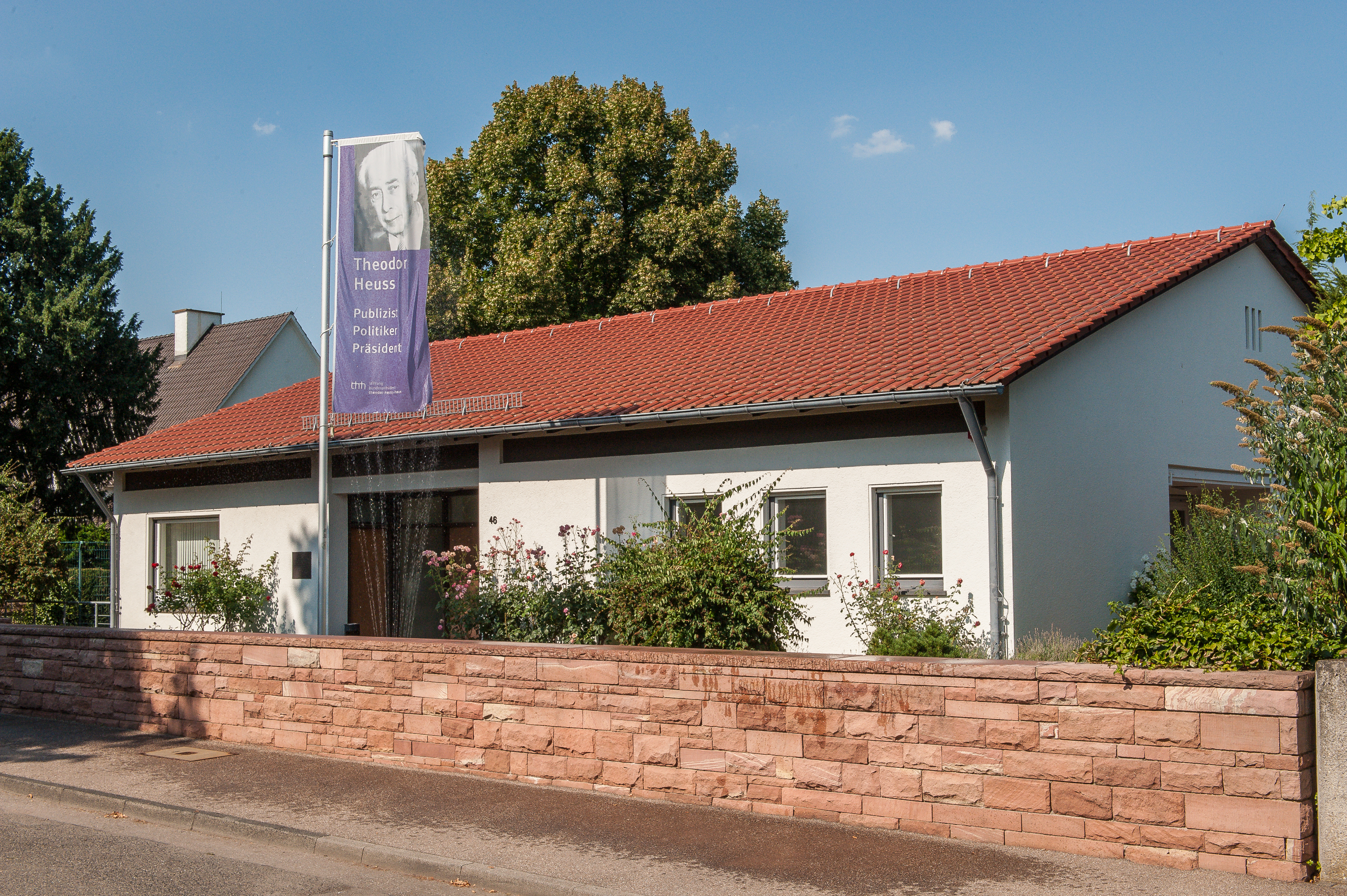 Theodor-Heuss-Haus, Stuttgart